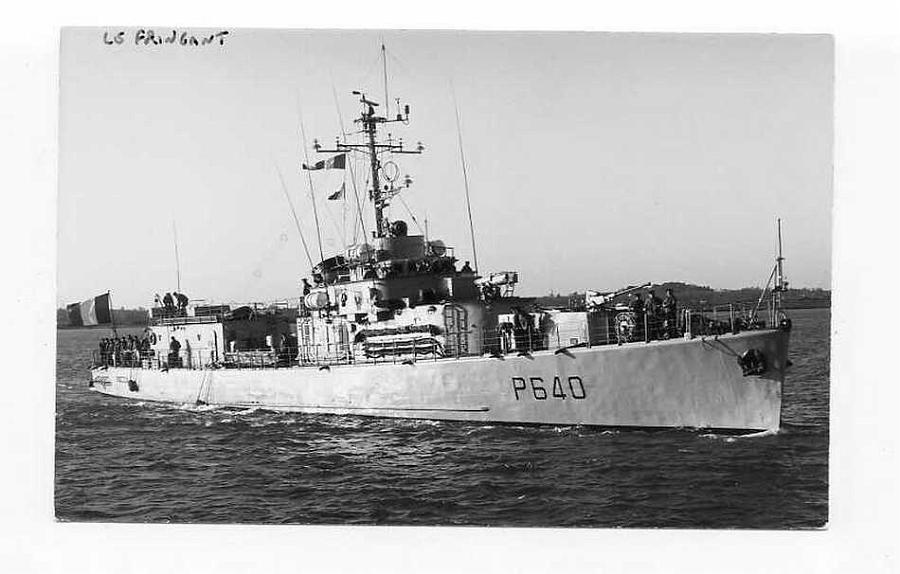 Le patrouilleur français P640 Le Fringant de la classe L'Adroit.